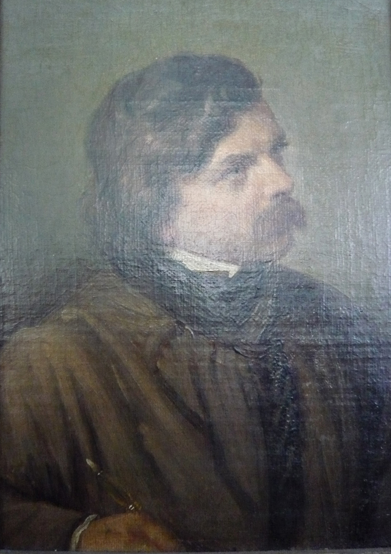 9 Köhler Prf. - Porträt Christian Köhler (1809–1861) - in Freundschaftsgalerie von Einzelbildnissen der Düsseldorfer Malerschüler und ihren Freunden (Vermächtnis des Künstlers)